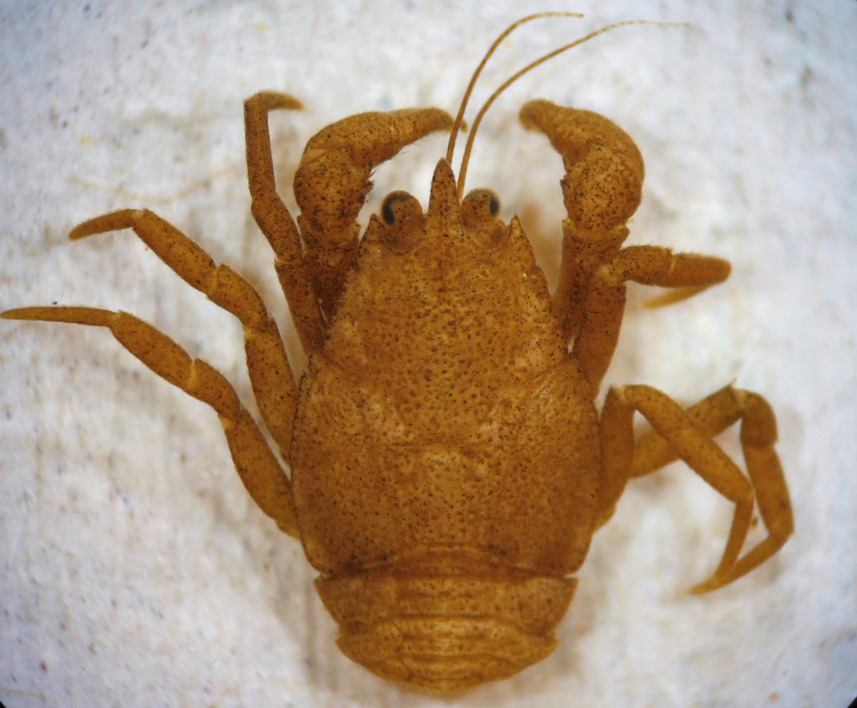 Decápodo del género Aegla. Origen: Región de Los Ríos, Chile.